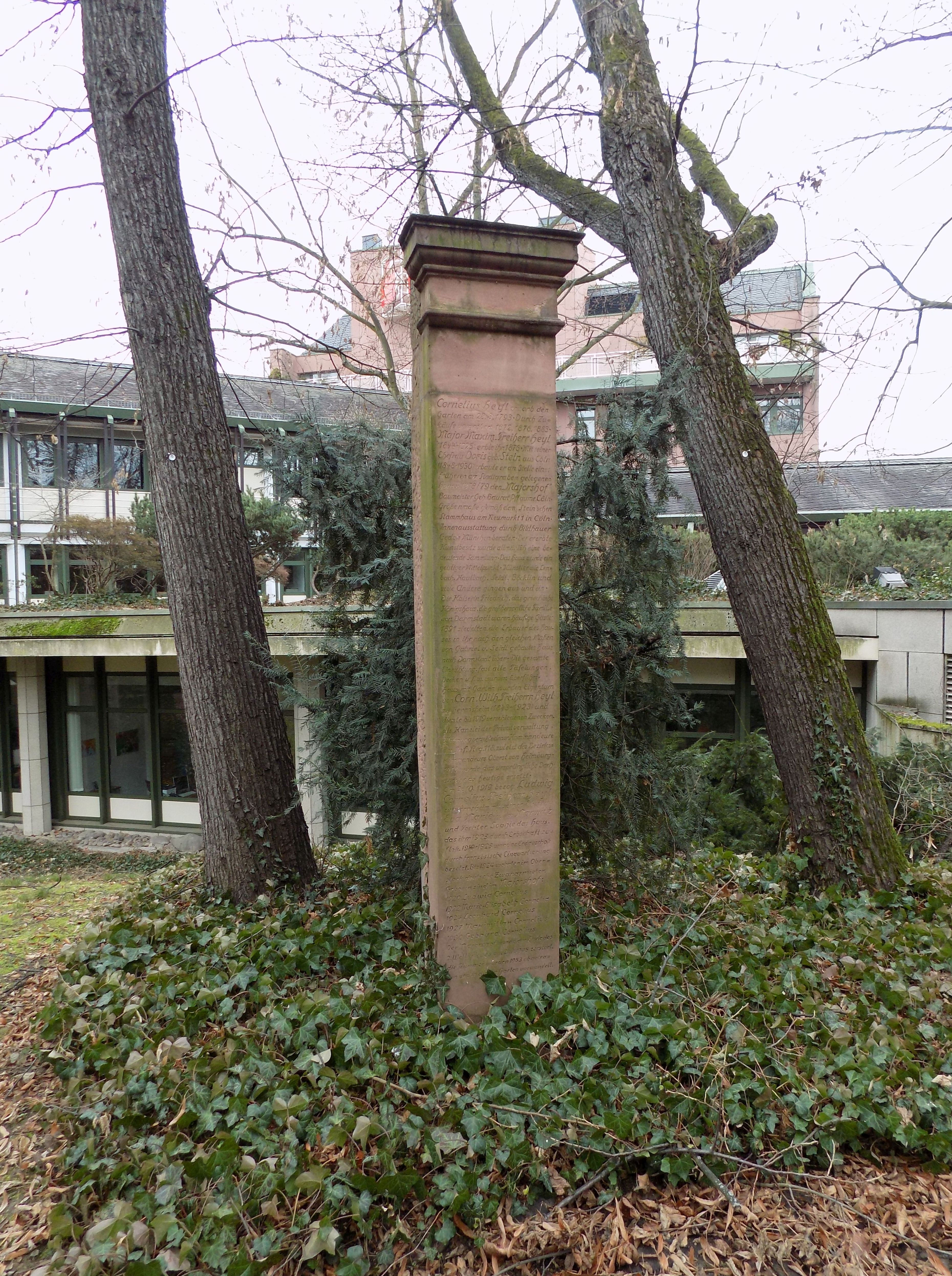 Infostele auf dem Grundstück des Majorshofs